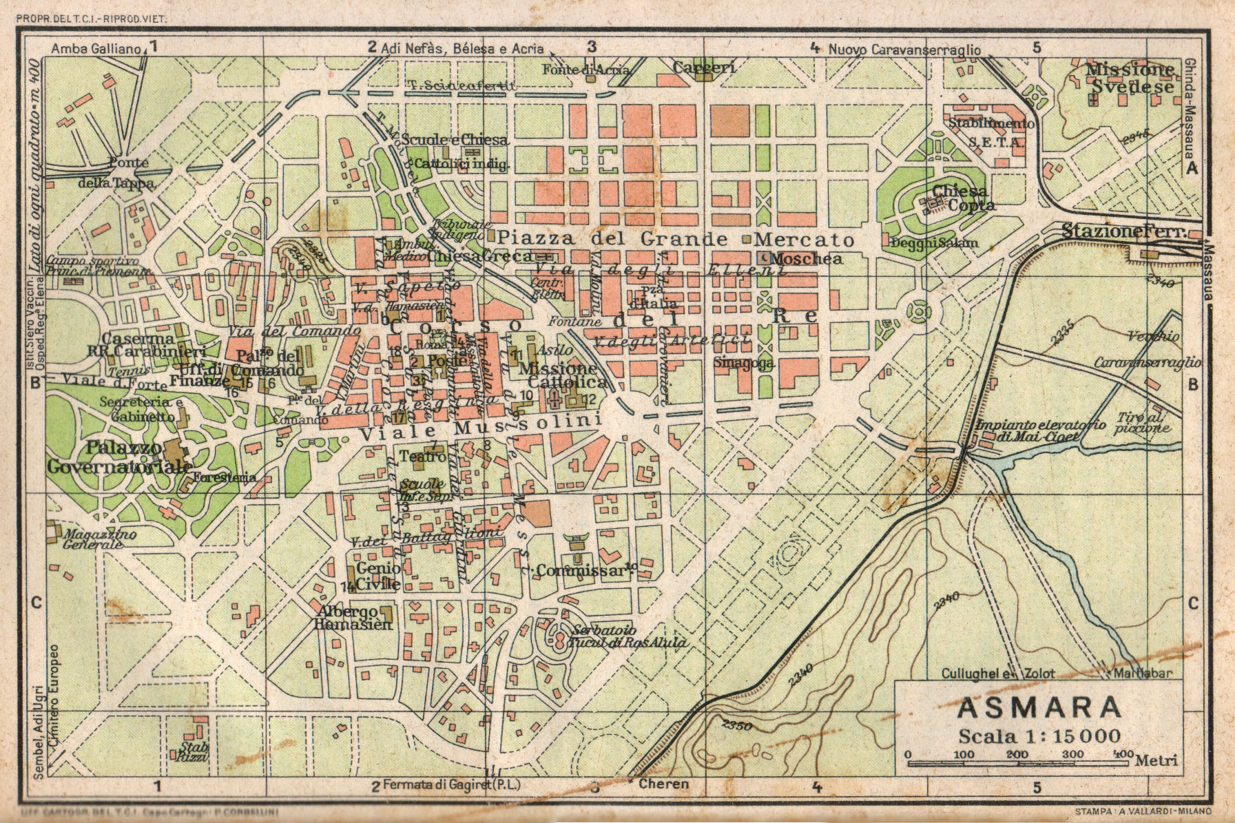 Cartina di Asmara del Touring Club Italiano, 1929, editore Vallardi, Milano